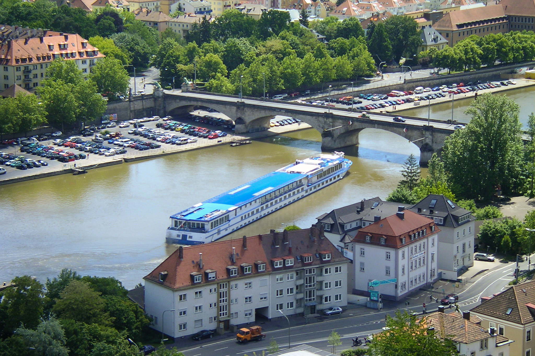 Passagierschiff kurz vor der Durchfahrt durch die Ludwigsbrücke in Würzburg